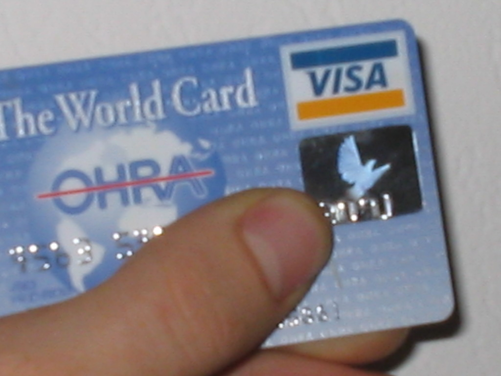 旧VISAロゴ.